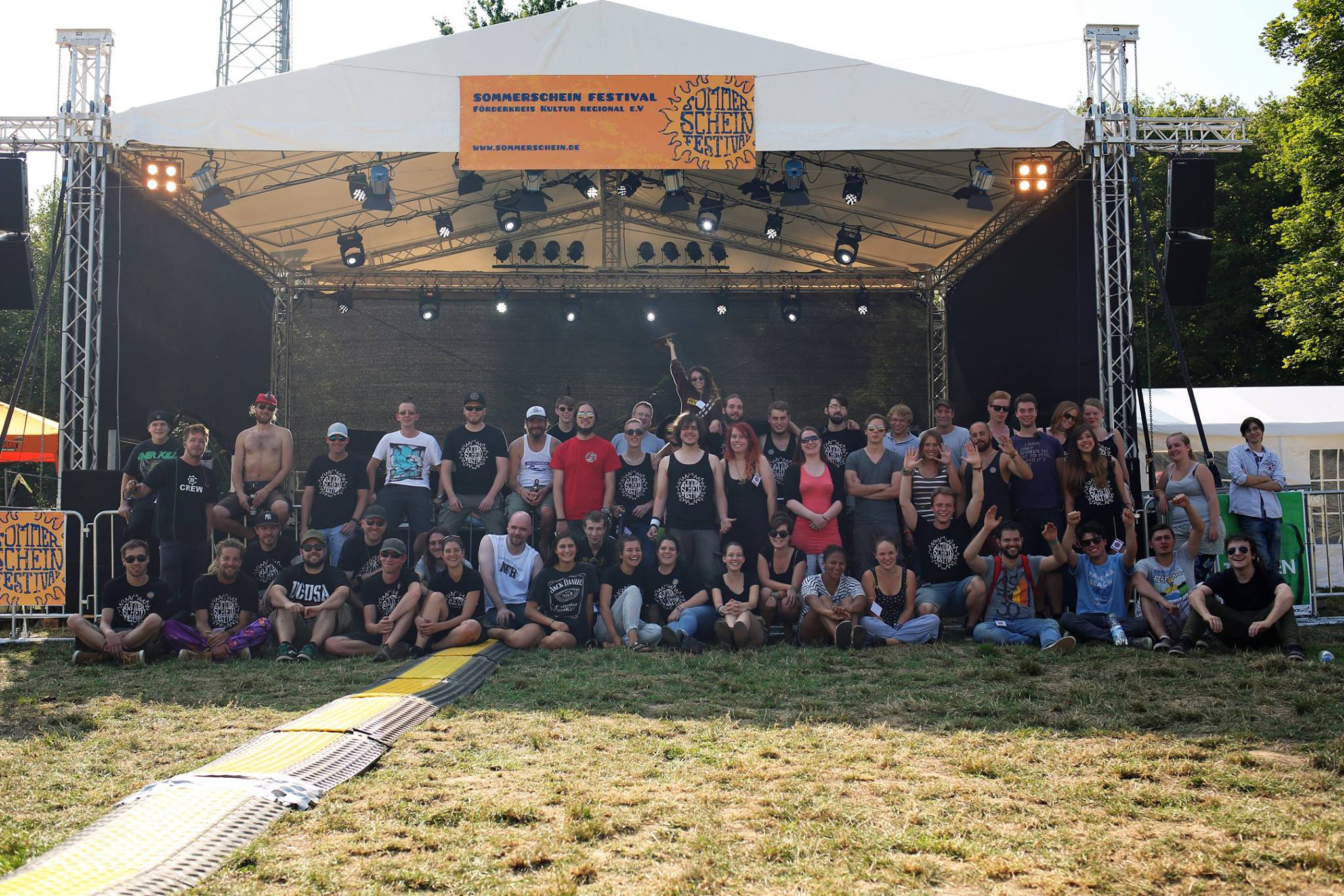 Die Sommerschein Festival Crew 2016